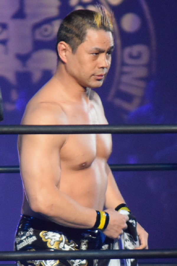 2017年2月11日 大阪府立体育会館 「THE NEW BEGINNING in OSAKA」 TAKAみちのく